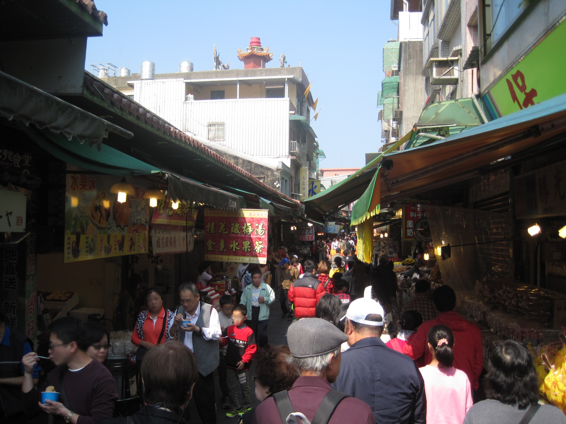 金山區金包里街人山人海之盛況